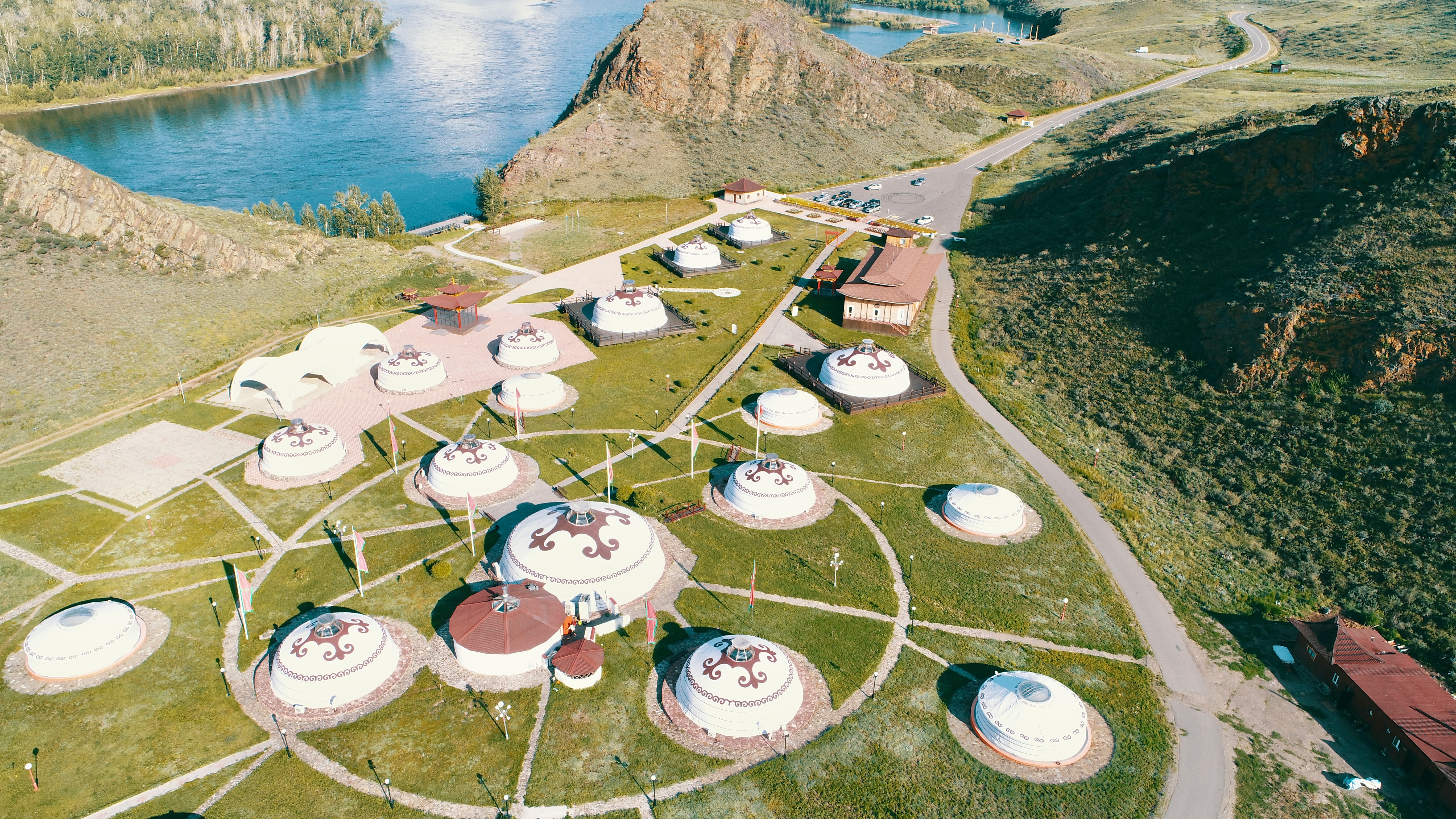 отдых и туризм